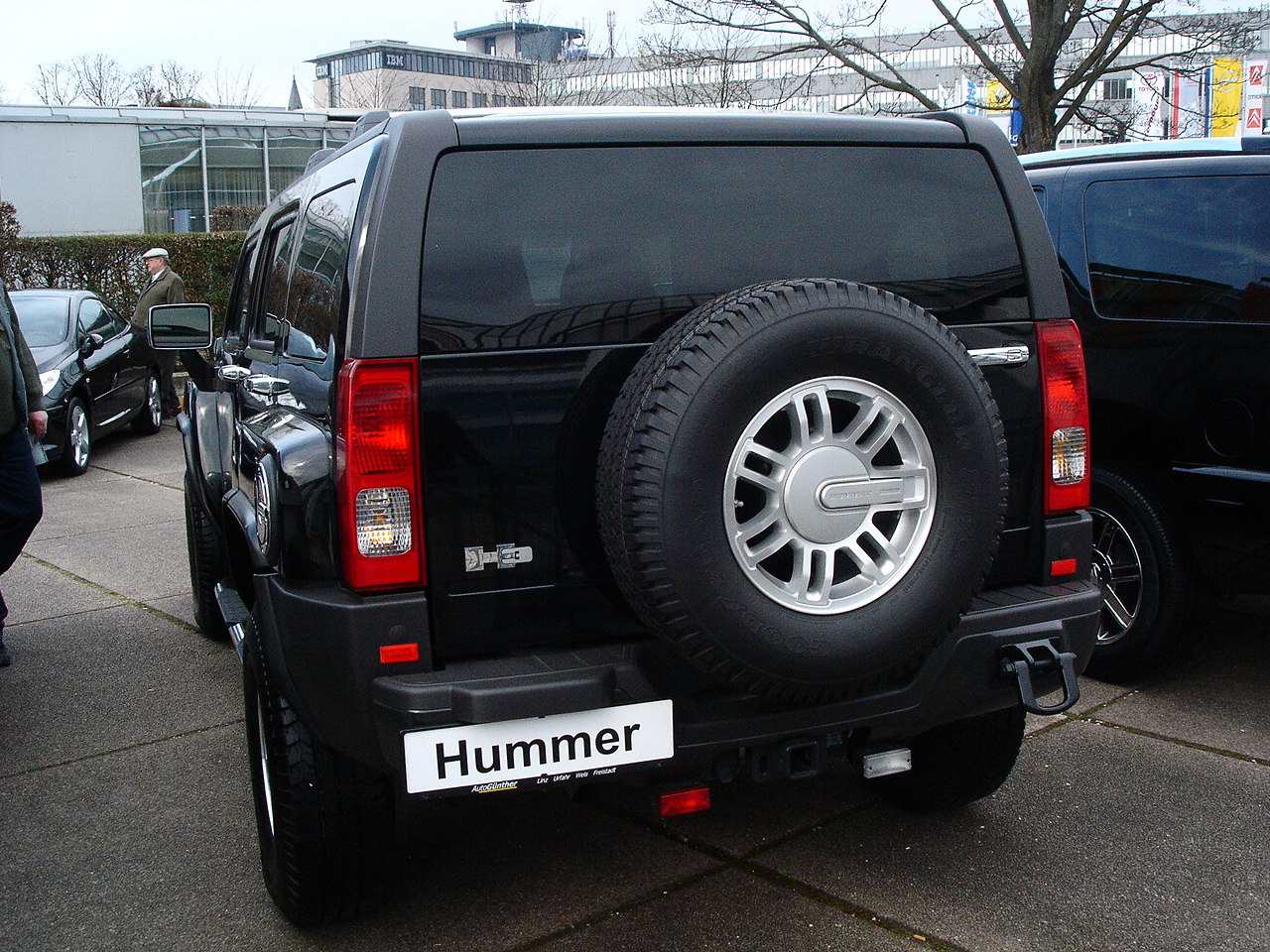 Heck eines Hummer H3